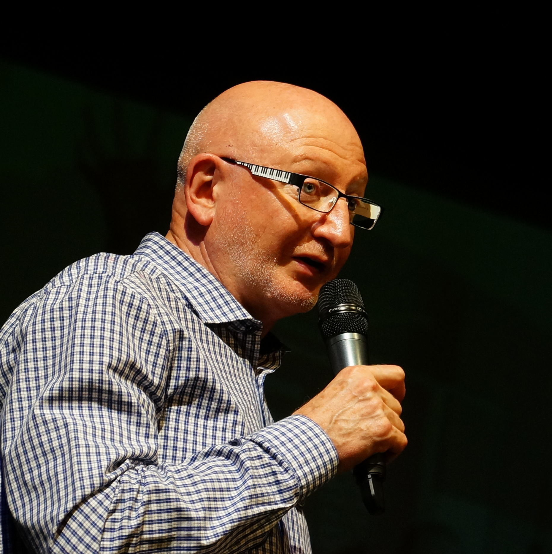 Bogusław Dziekański. Szef Jazz Clubu "Pod Filarami" w Gorzowie.